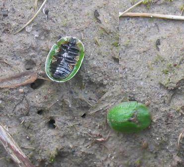 Schildpadtor/Cassida rubiginosa Eigen foto B Kimmel